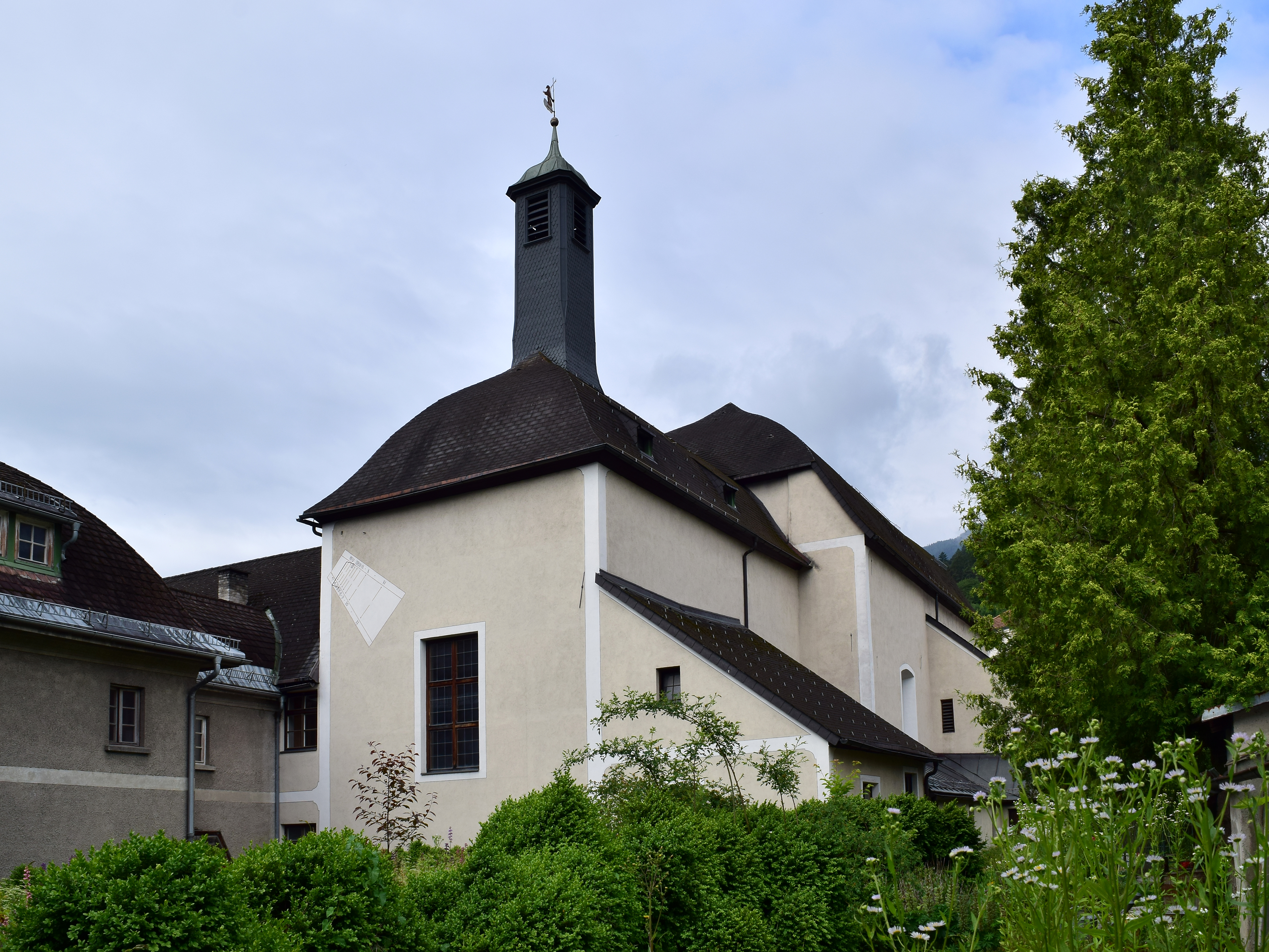 Kapuzinerkloster und Kirche hl. Josef mit Gartendenkmalen, künstlichen Wegsystemen und Ummauerung